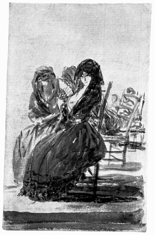 Dibujo preparatorio del capricho nº 15. Pertenece al Álbum llamado A o Álbum de Sanlúcar.